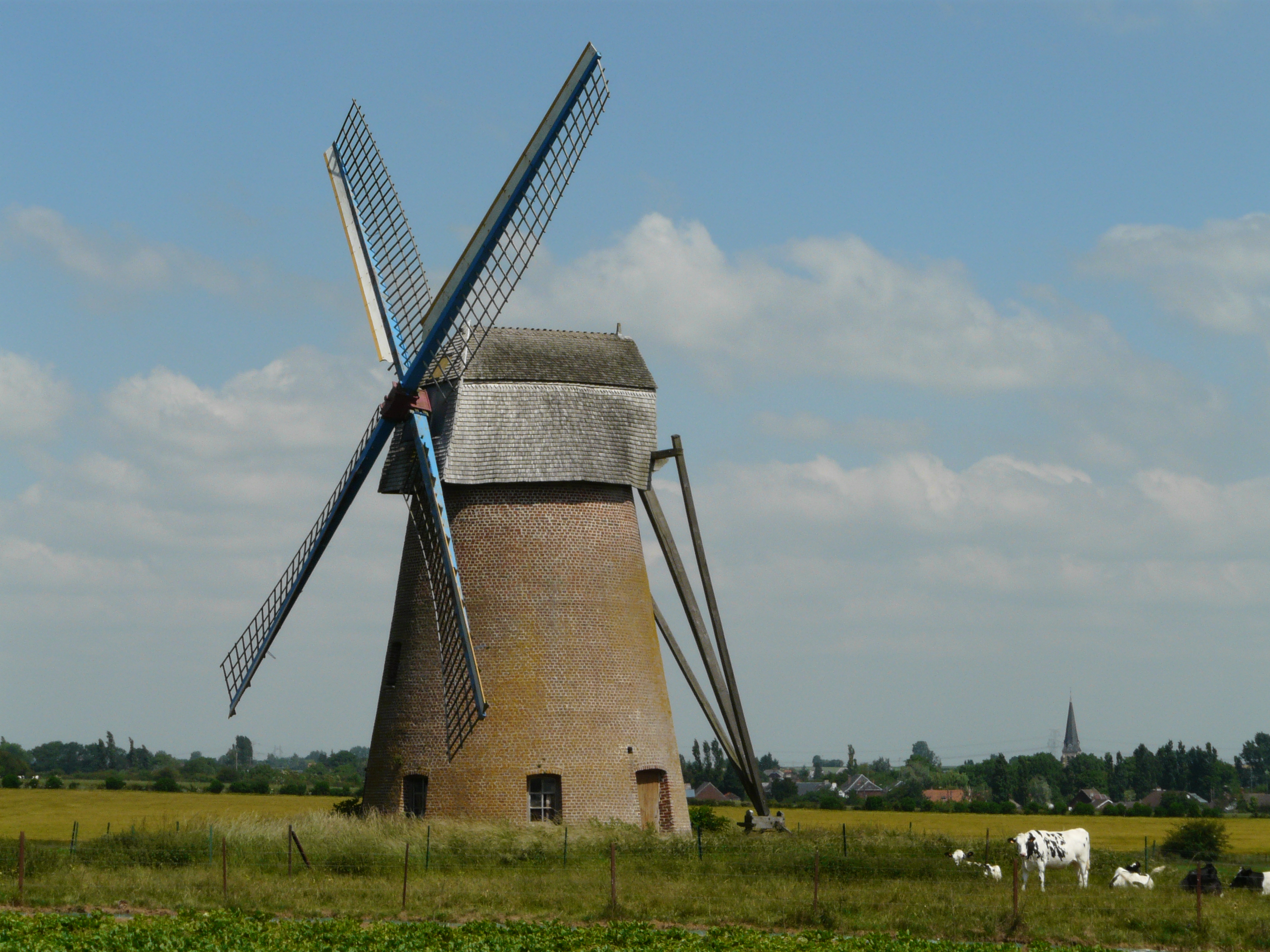 Moulin à vent de Saint-Vaast (Nord, France)